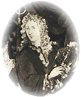 Henri van Soest, maître ébéniste français du XVIIe siècle. On a longtemps cru que ce portrait représentait André-Charles Boulle, maître ébéniste sculpteur, fondeur, ciseleur, doreur, peintre et dessinateur français du XVIIe siècle, né à Paris le 11 novembre 1642, mort le 29 février 1732.